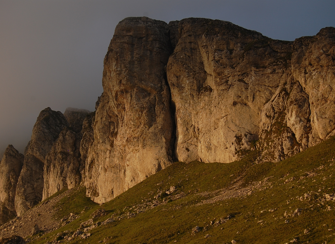 Bucegi mountains Romania